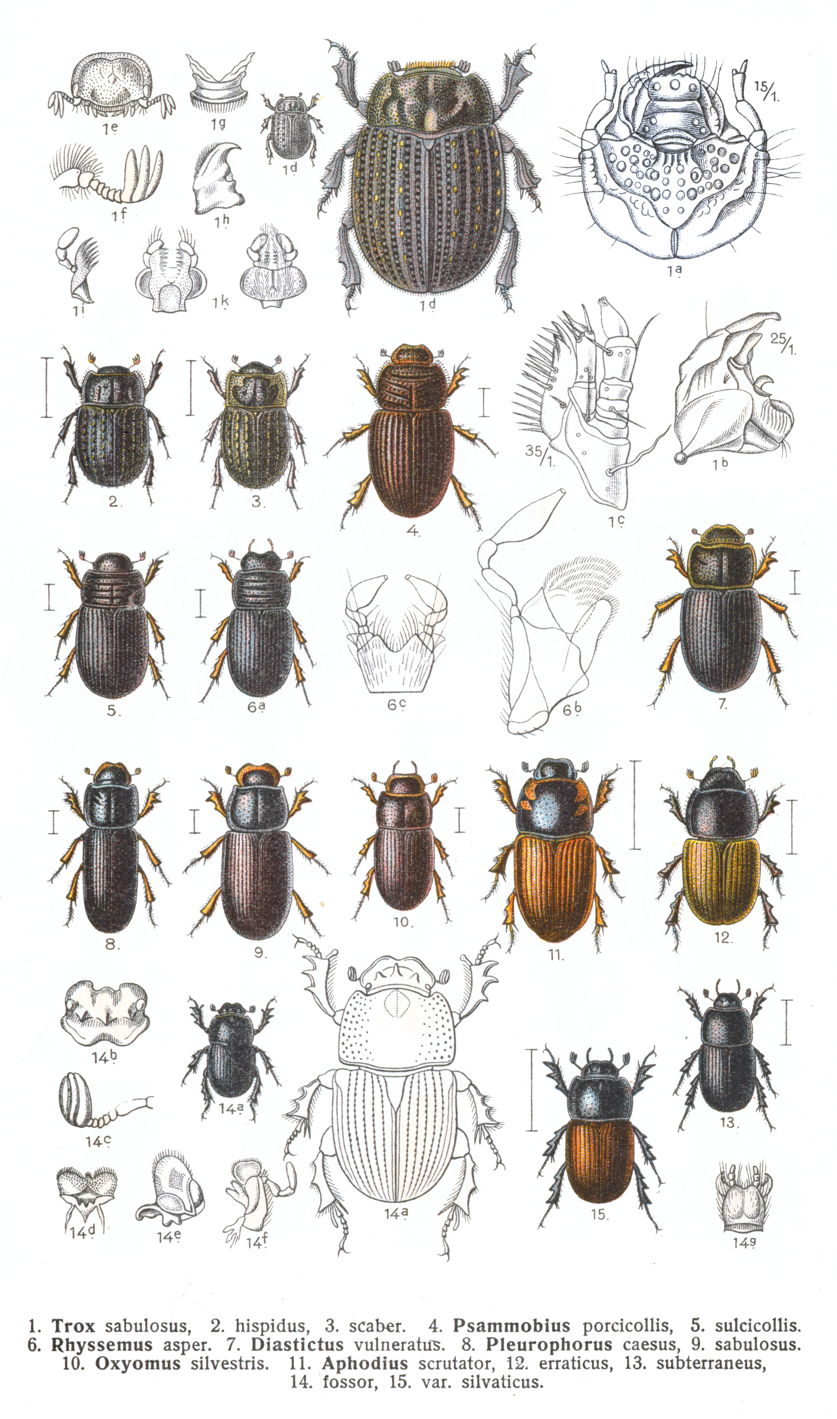 See image for index to numbers. Trox sabulosus Lin. = Trox sabulosus (Linnaeus, 1758) (1a: head of larva, 1b: mandible of larva, 1c: maxilla of larva, 1d: adult, dorsal view and size comparison, 1e: head of adult, frontal view, 1f: antenna of adult, 1g: labrum of adult, 1h: mandible of adult, 1i: maxilla of adult, 1k: labium of adult, dorsal and ventral views) Trox hispidus Pontopp. = Trox hispidus Pontoppidan, 1763, adult, dorsal view Trox scaber Lin. = Trox scaber (Linnaeus, 1767), adult, dorsal view Psammobius porcicollis Illig. = Brindalus porcicollis (Illiger, 1803), adult, dorsal view Psammobius sulcicollis Illig. = Psammodius asper (Fabricius, 1775), adult, dorsal view Rhyssemus asper F. = Psammodius asper (Fabricius, 1775) (6a: adult, dorsal view, 6b: maxilla, 6c: labium) Diastictus vulneratus Strm. = Diastictus vulneratus (Sturm, 1805), adult, dorsal view Pleurophorus caesus Panz. = Pleurophorus caesus (Panzer, 1796), adult, dorsal view Pleurophorus sabulosus Muls. = Platytomus tibialis (Fabricius, 1798), adult, dorsal view Oxyomus sylvestris Scop. = Oxyomus sylvestris (Scopoli, 1763), adult, dorsal view Aphodius scrutator Hrbst. = Aphodius scrutator (Herbst, 1789), adult, dorsal view Aphodius erraticus Lin. = Aphodius erraticus (Linnaeus, 1758), adult, dorsal view Aphodius subterraneus Lin. = Aphodius subterraneus (Linnaeus, 1758), adult, dorsal view Aphodius fossor Lin. = Aphodius fossor (Linnaeus, 1758) (14a: adult, dorsal view and size comparison, 14b: head, frontal view, 14c: antenna, 14d: labrum, 14e: mandible, 14f: maxilla, 14g: labium) Aphodius fossor Lin. ab. silvaticus = Aphodius fossor (Linnaeus, 1758) f. silvaticus, adult, dorsal view